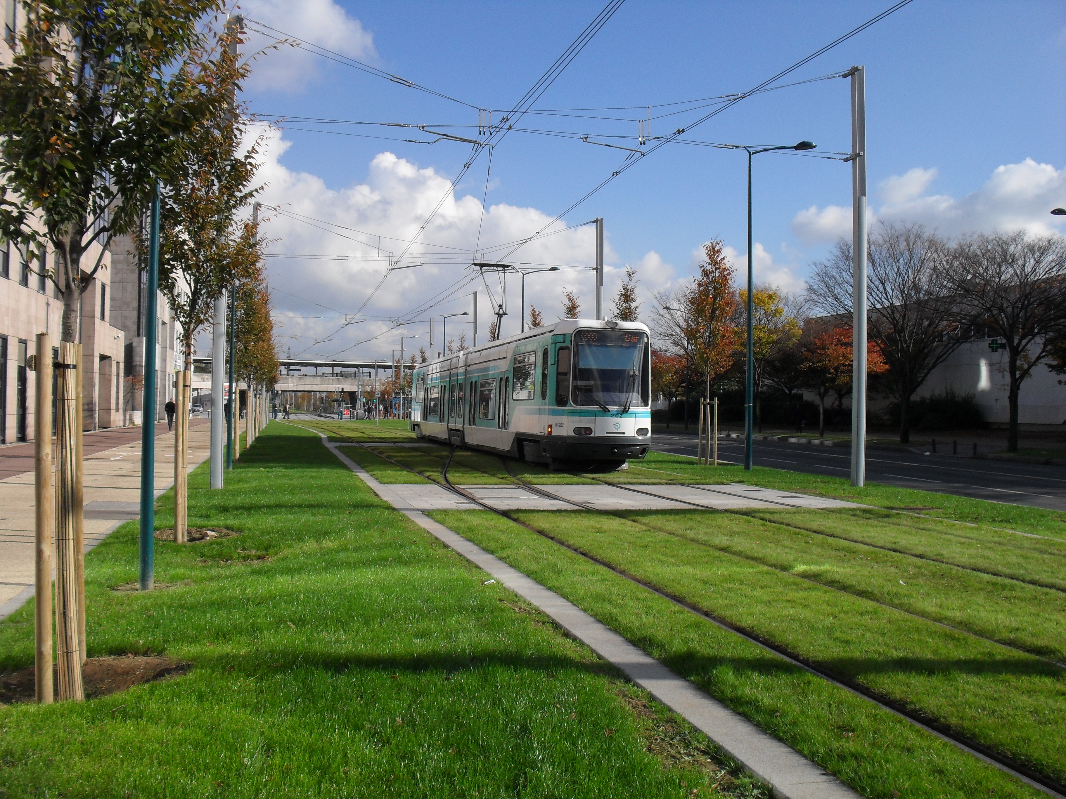 Paris Tramway ligne 1